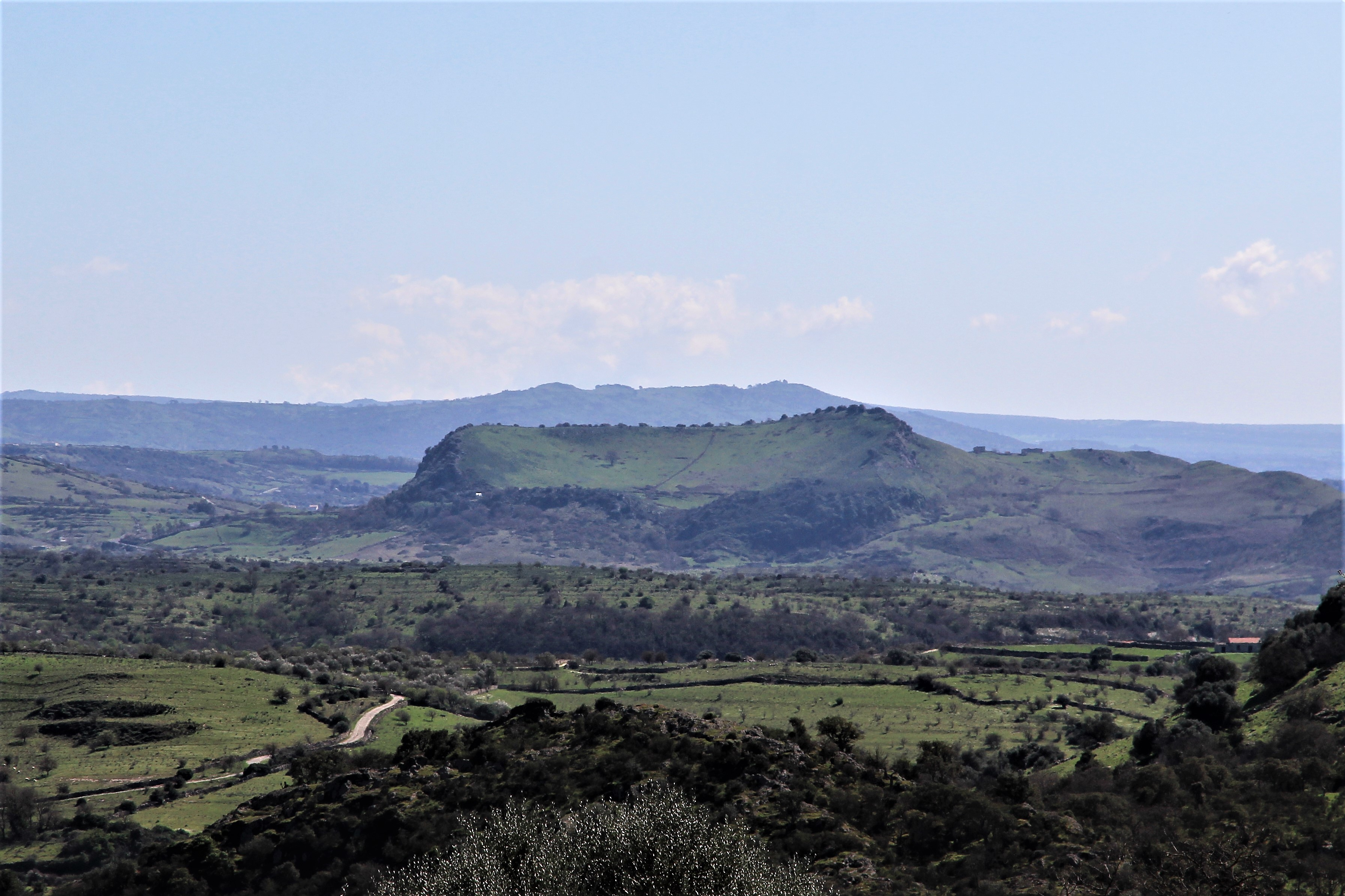 Monte Larenta